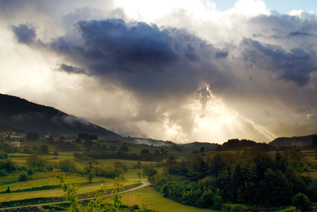 Altopiano di Asiago